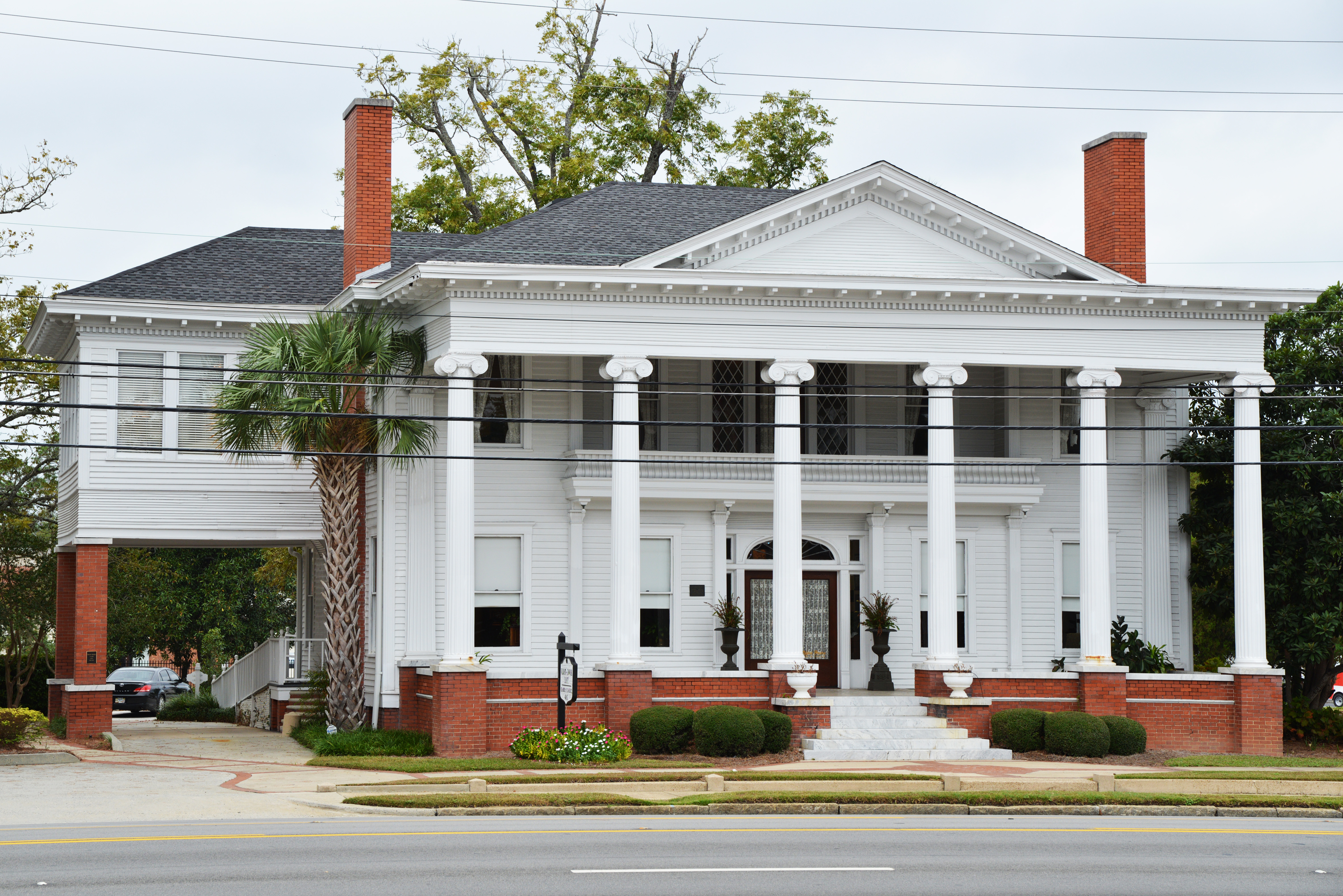 Barber-Pittman House, Valdosta, Georgia, US